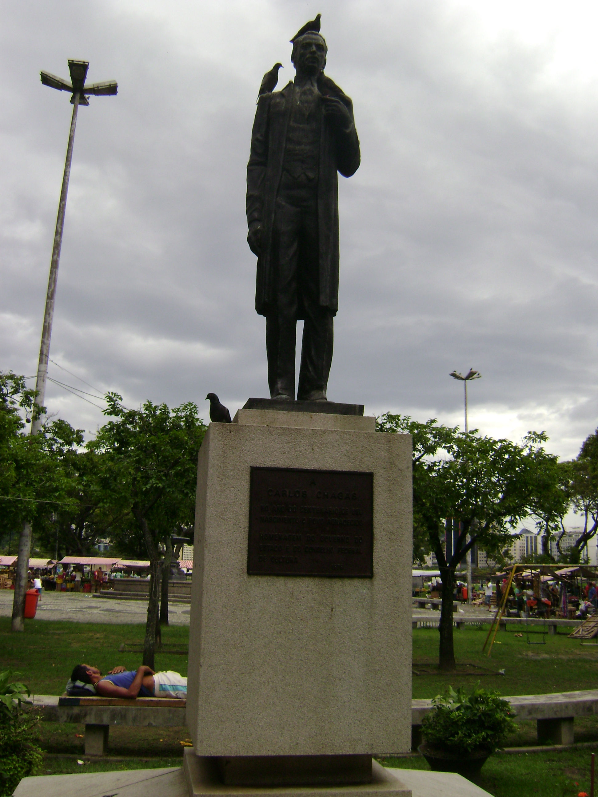 Estátua de Carlos Chagas na cidade do Rio de Janeiro, Brasil.